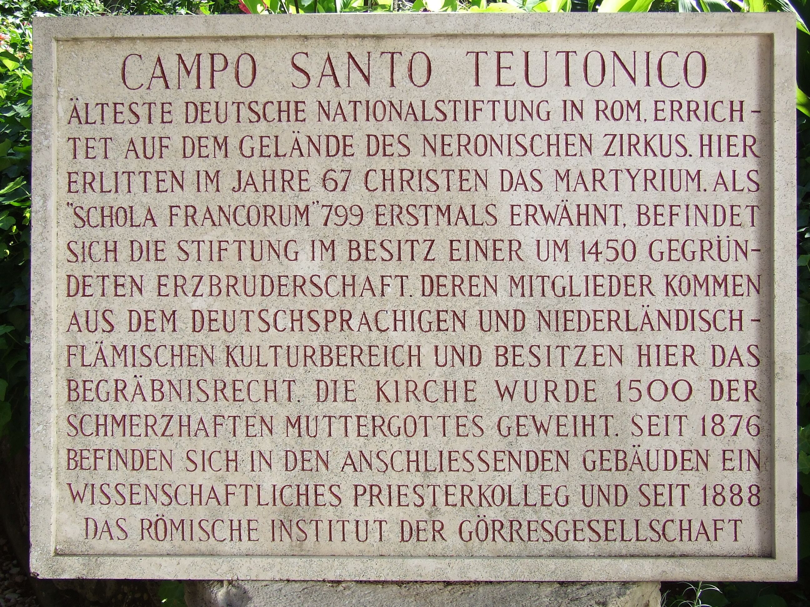 Tafel am Eingang des deutschen Friedhofs.